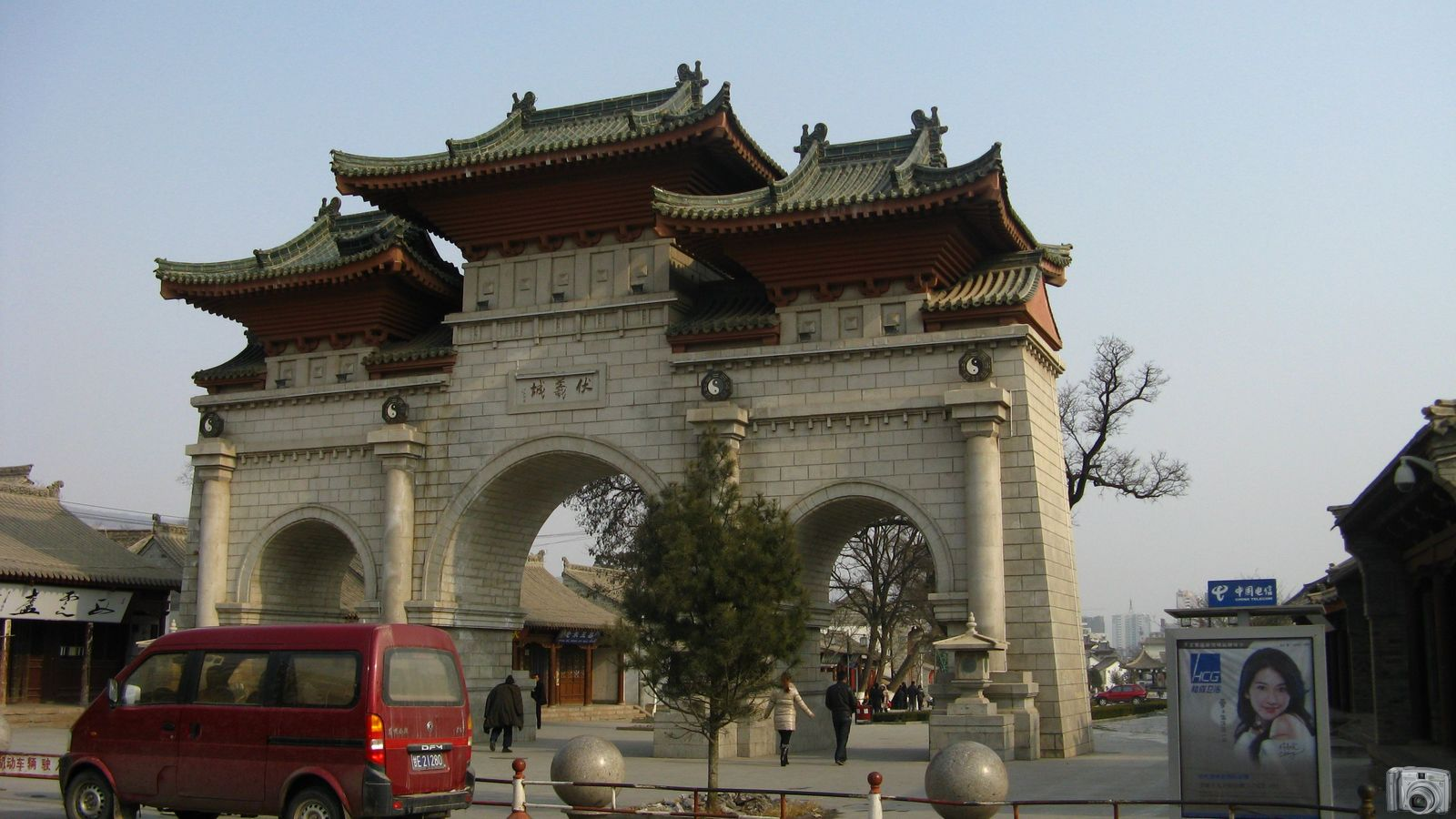 伏羲城西大门